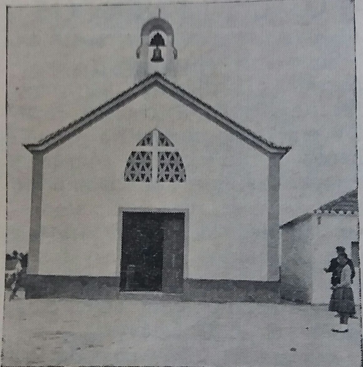 Igreja de São João de Deus do Biscainho-anos 60